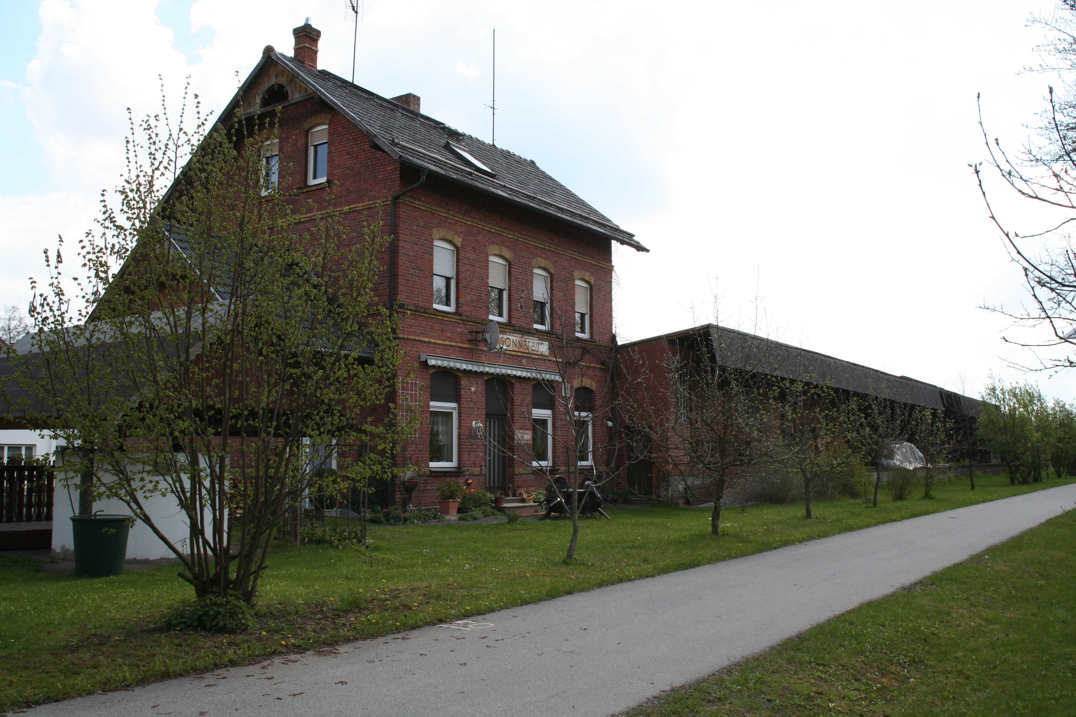 ehemaliger Bahnhof Sonnefeld im Landkreis Coburg